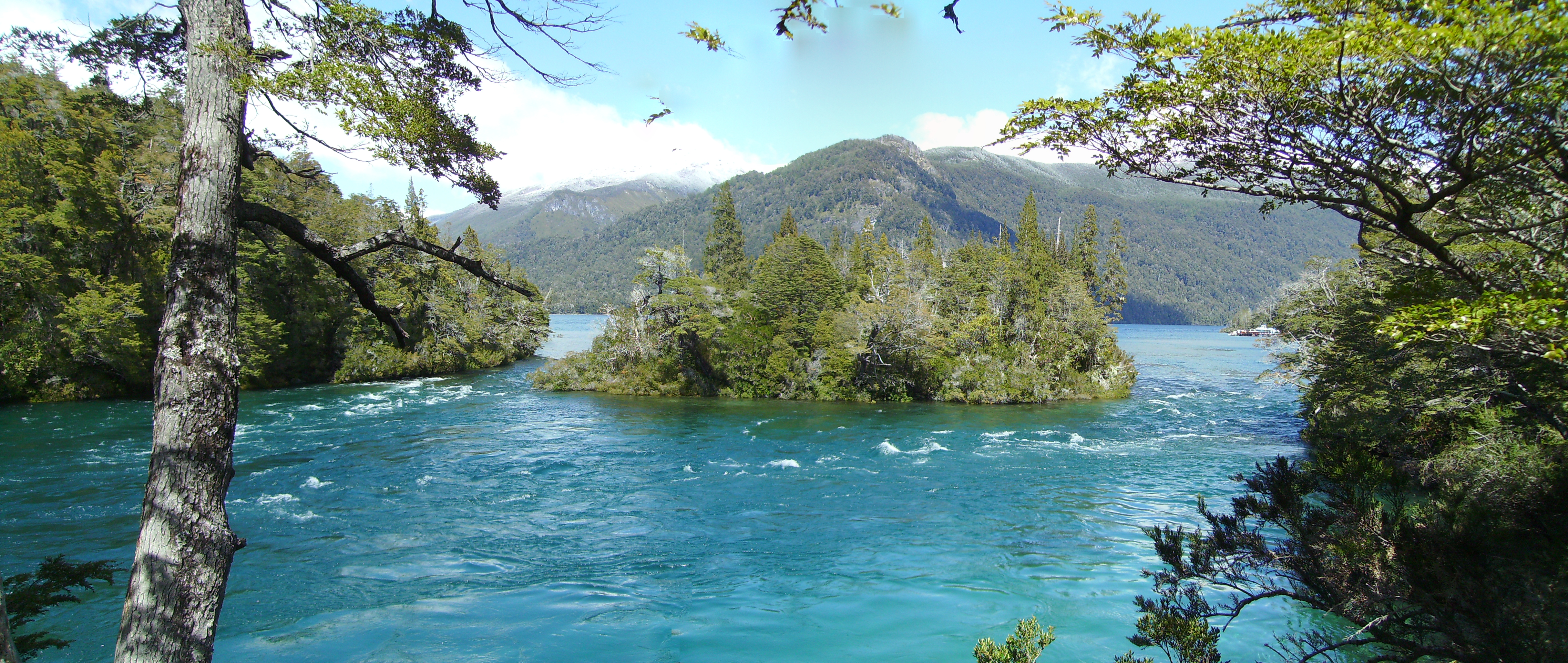 Parque Nacional Los Alerces - Chubut - Argentina